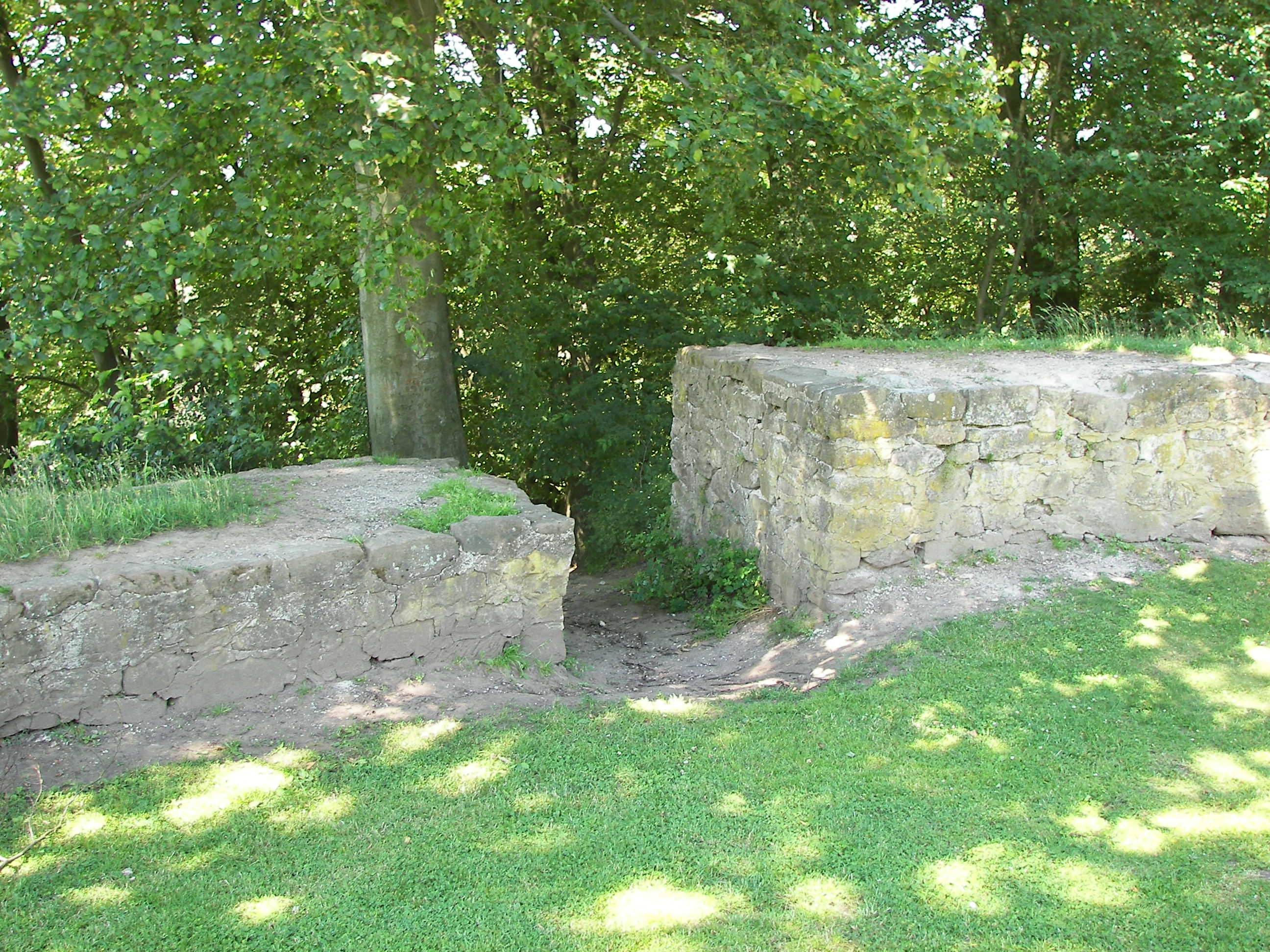 Christenberg, Burgmauer